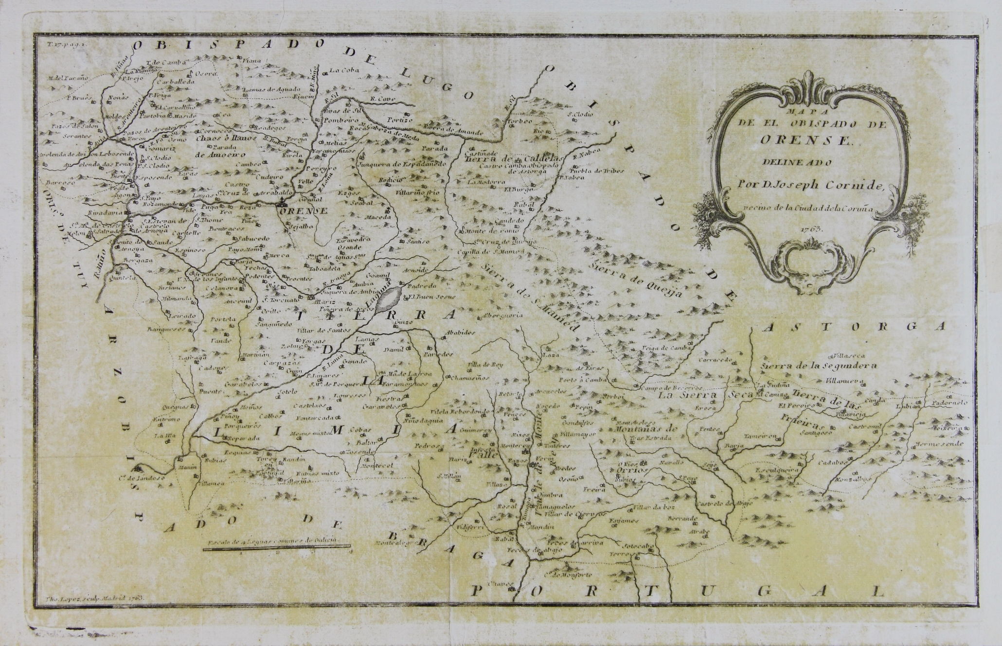 Mapa do bispado de Ourense de Joseph Cornide.